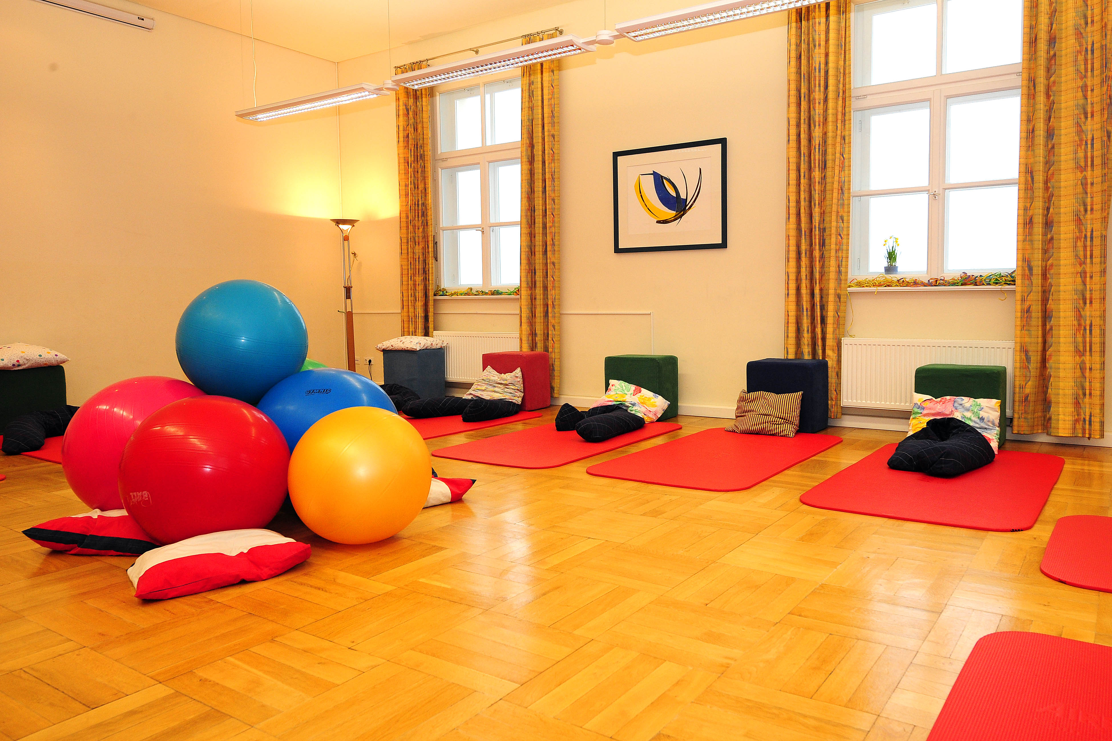 Kursraum KBW